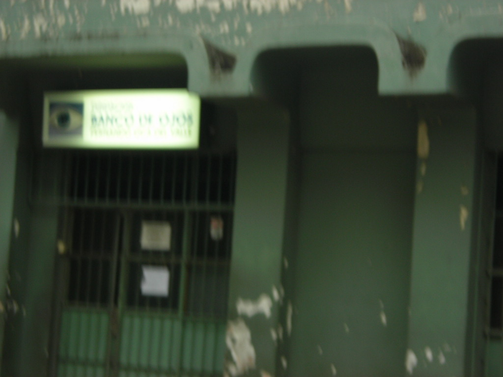 ojo